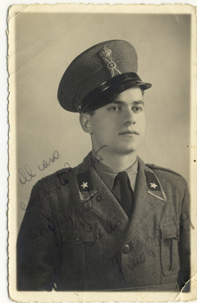 immagine di Carlo Fila